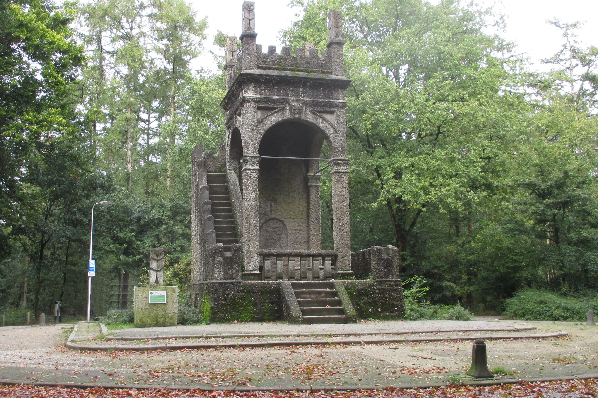 Uilentoren Leersum in 2019 gelegen bovenaan de lombokheuvel. Links van de Uilentoren staat op een sokkel de in 2012 teruggevonden originele vierde uil. Op de toren zelf is deze na de vermissing in 1966 vervangen door een replica.